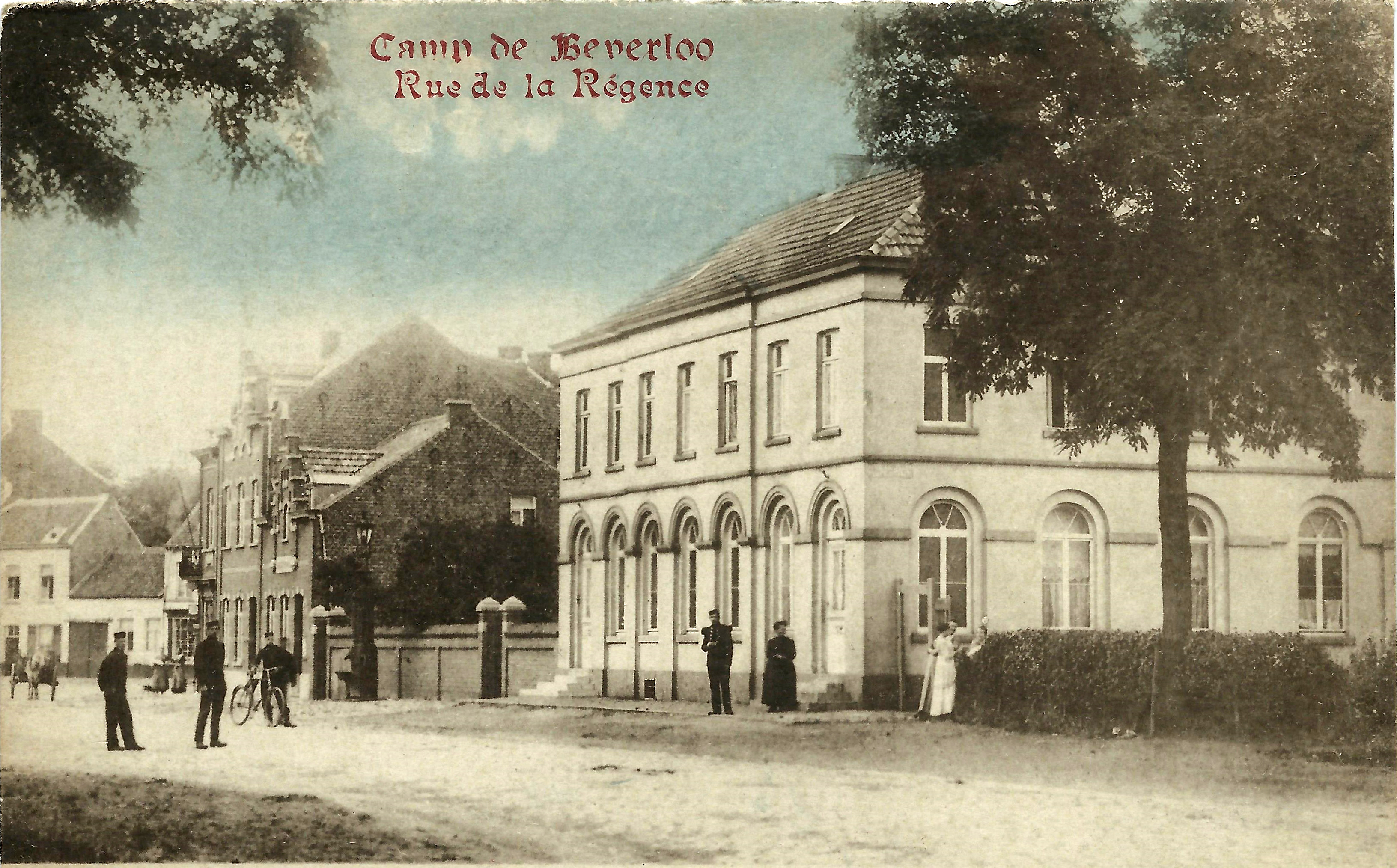 Briefkaart van het legerkamp Beverloo